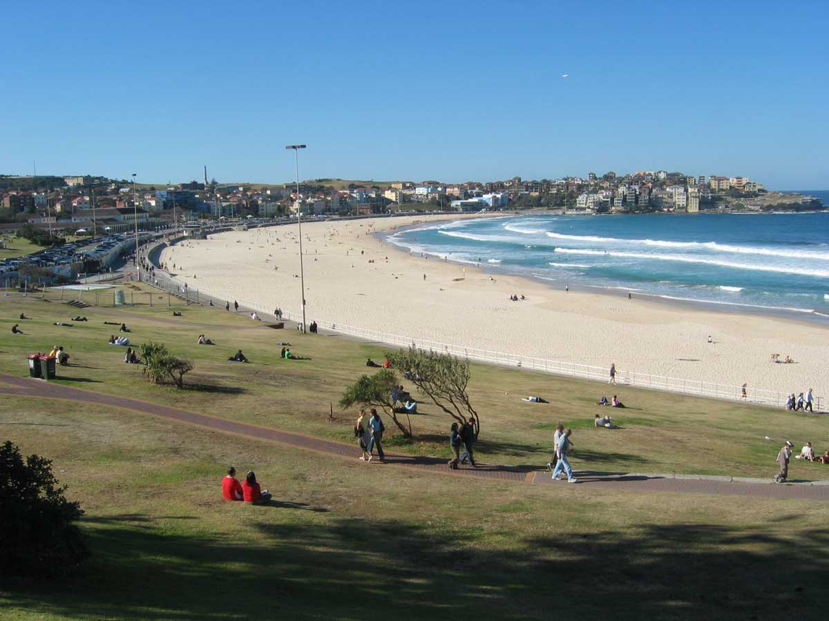 Bondi Beach in Winter